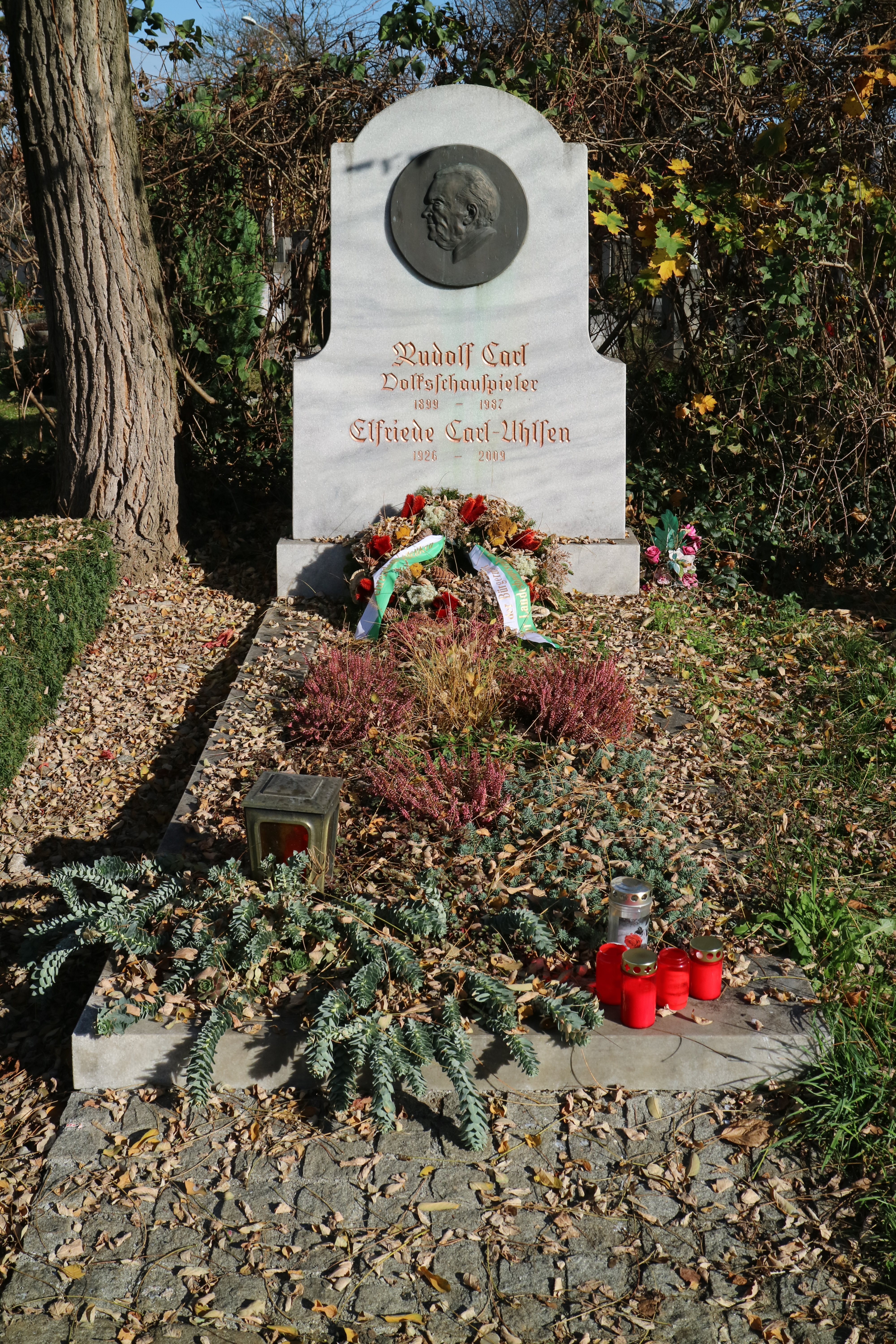 Grab des Schauspielers und Komikers Rudolf Carl (1899–1987) am Zentralfriedhof Graz